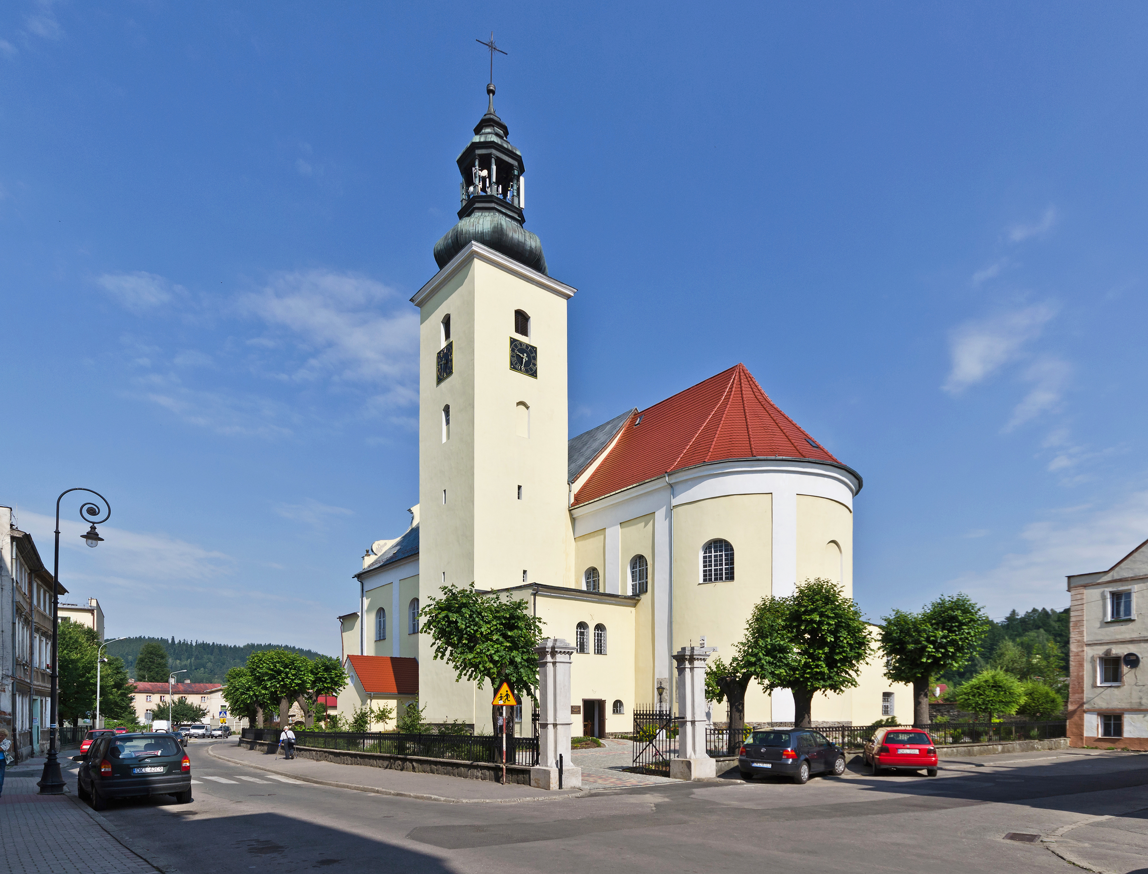 Lądek-Zdrój, kościół par. p.w. Narodzenia NMP, XVII